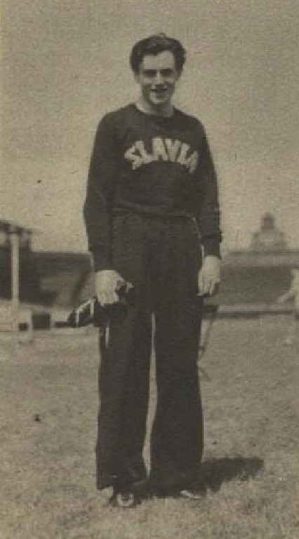 Evžen Rošický (1914-1942), český atlet a sportovní novinář